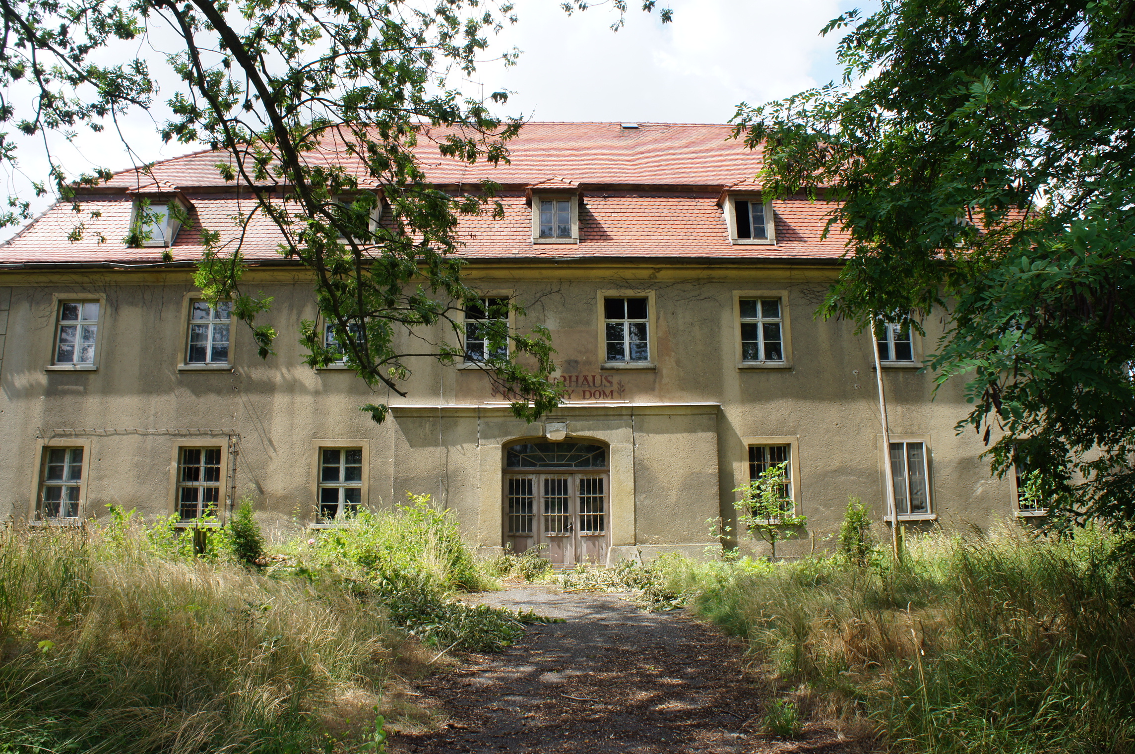 Rittergut in Sollschwitz bei Göda. Erbaut im 18. Jh., heute leerstehend und dem Verfall preißgegeben. Ostansicht